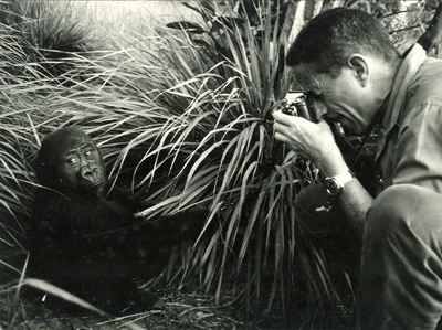 Jordi Sabater Pi fotografiant un goril·la a la Guinea Espanyola